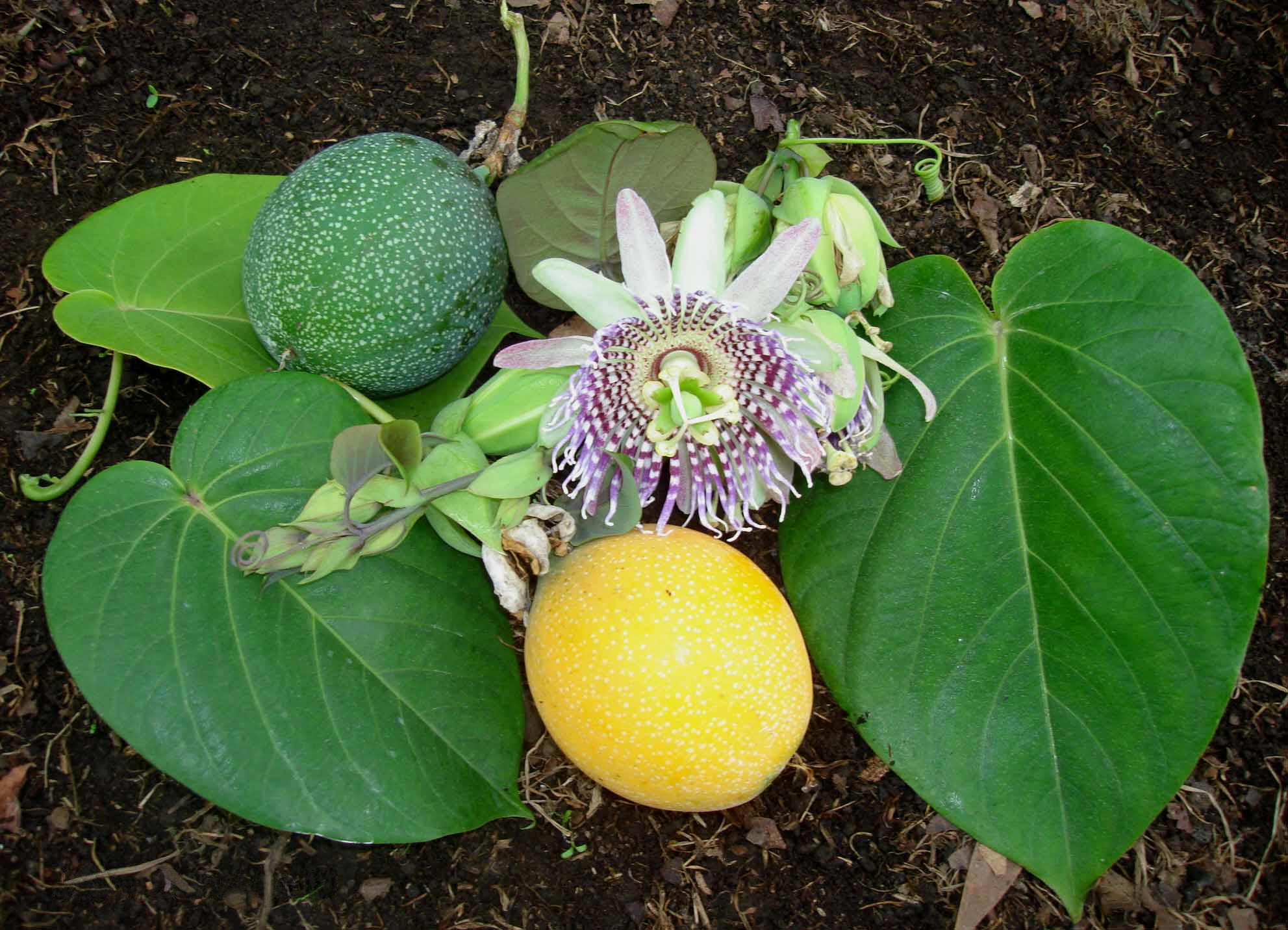 Passiflora ligularis Juss. (Subgénero Passiflora), especie cultivada.